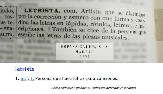 Las imagenes pertenecen arriba, a la Enciclopedia Espasa-Calpe (VII Ed.) de 1957 y la página de la RAE en 2017, abajo